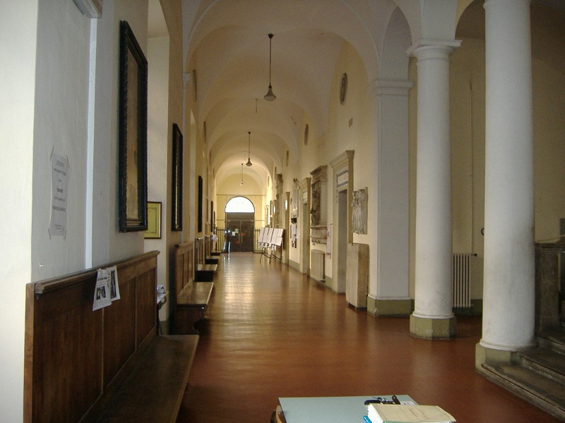 Liceo Torricelli Faenza. Atrio della sede storica. Palazzo degli Studi, Via S.Maria dell'Angelo 1.